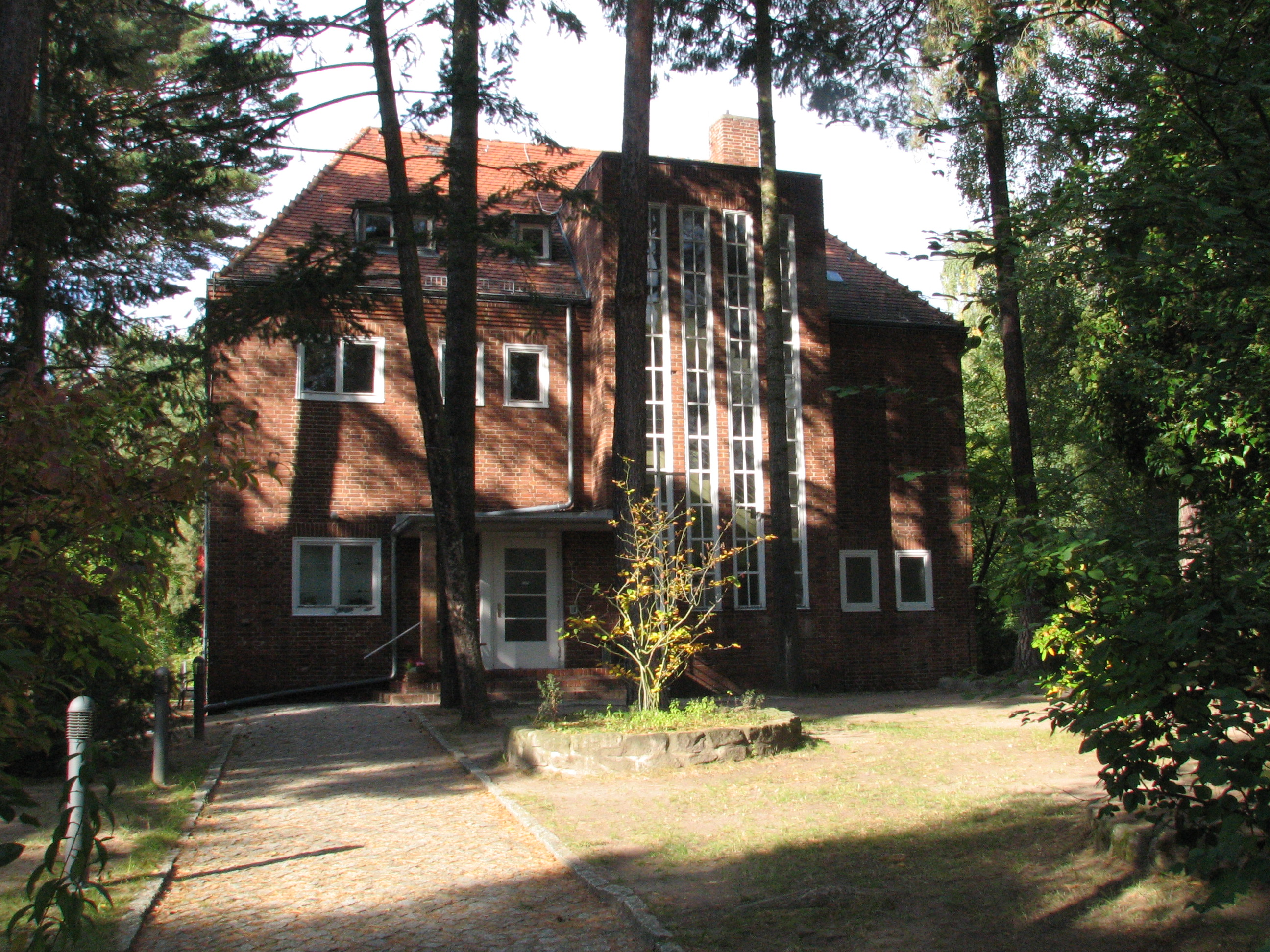 Baudenkmal: Jägerstieg 2, Kleinmachnow, ehemaliges Gemeindehaus der evangelischen Auferstehungsgemeinde. Die Kirche wurde zu Ostern 2018 entwidmet.